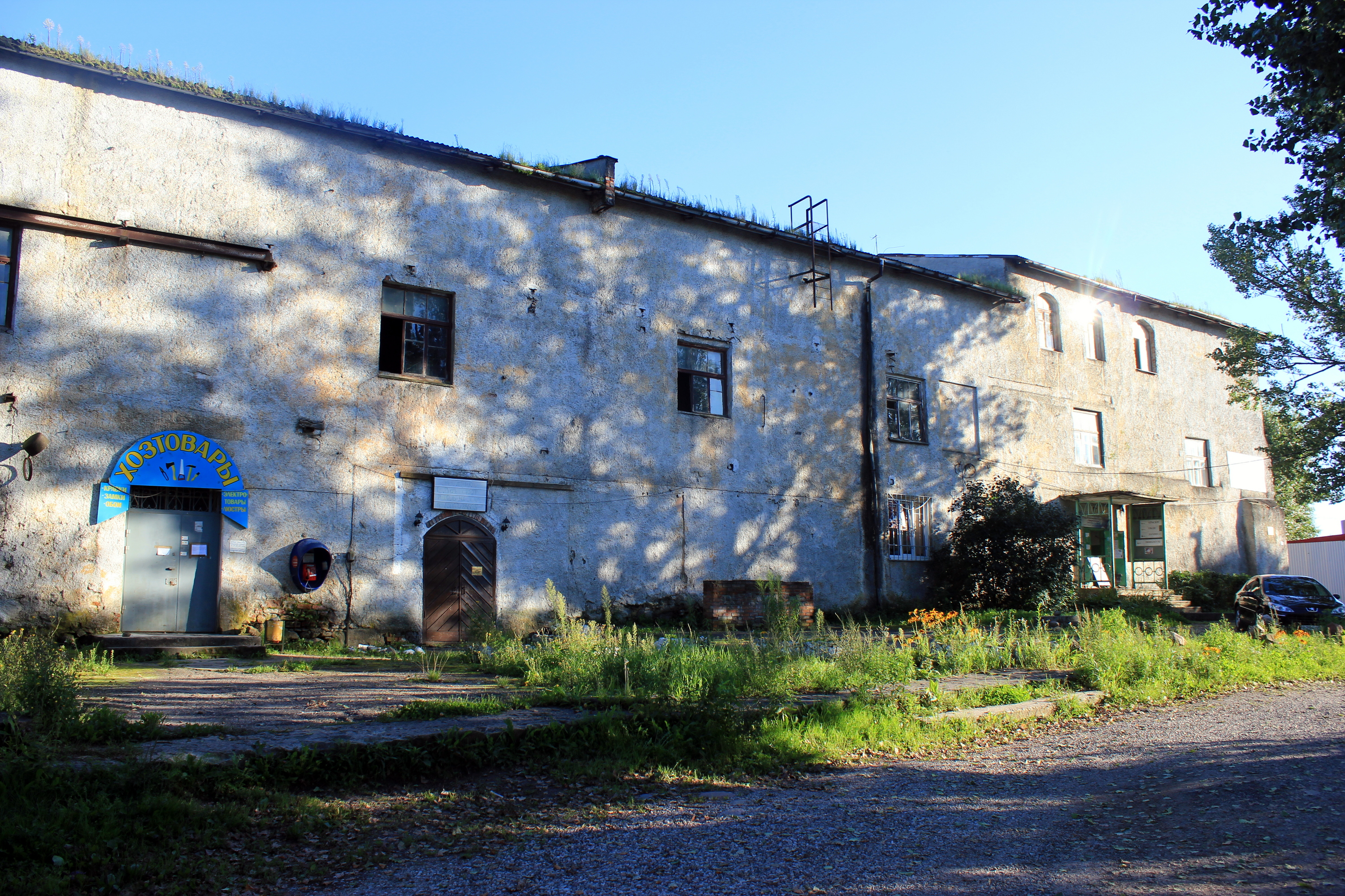 Erhaltenes Erdgeschoss der Ordensburg Labiau (heute Polessk, Kaliningrader Oblast).